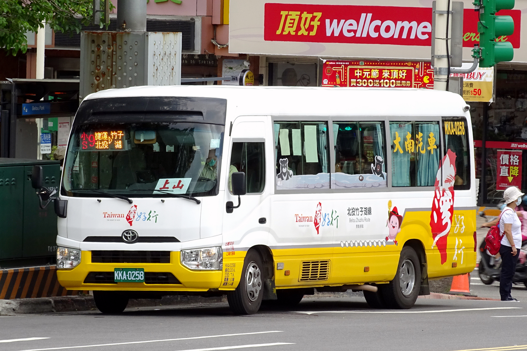 TOYOTA - XZB70L - KKA-0258